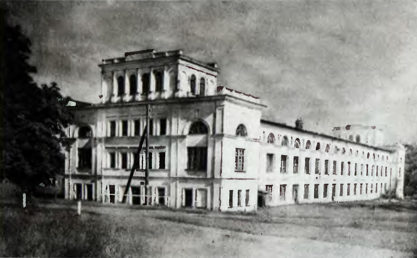 Беларуская (тарашкевіца): Парэчча (Parečča). Суконная фабрыка Скірмунтаў (Skirmunt)